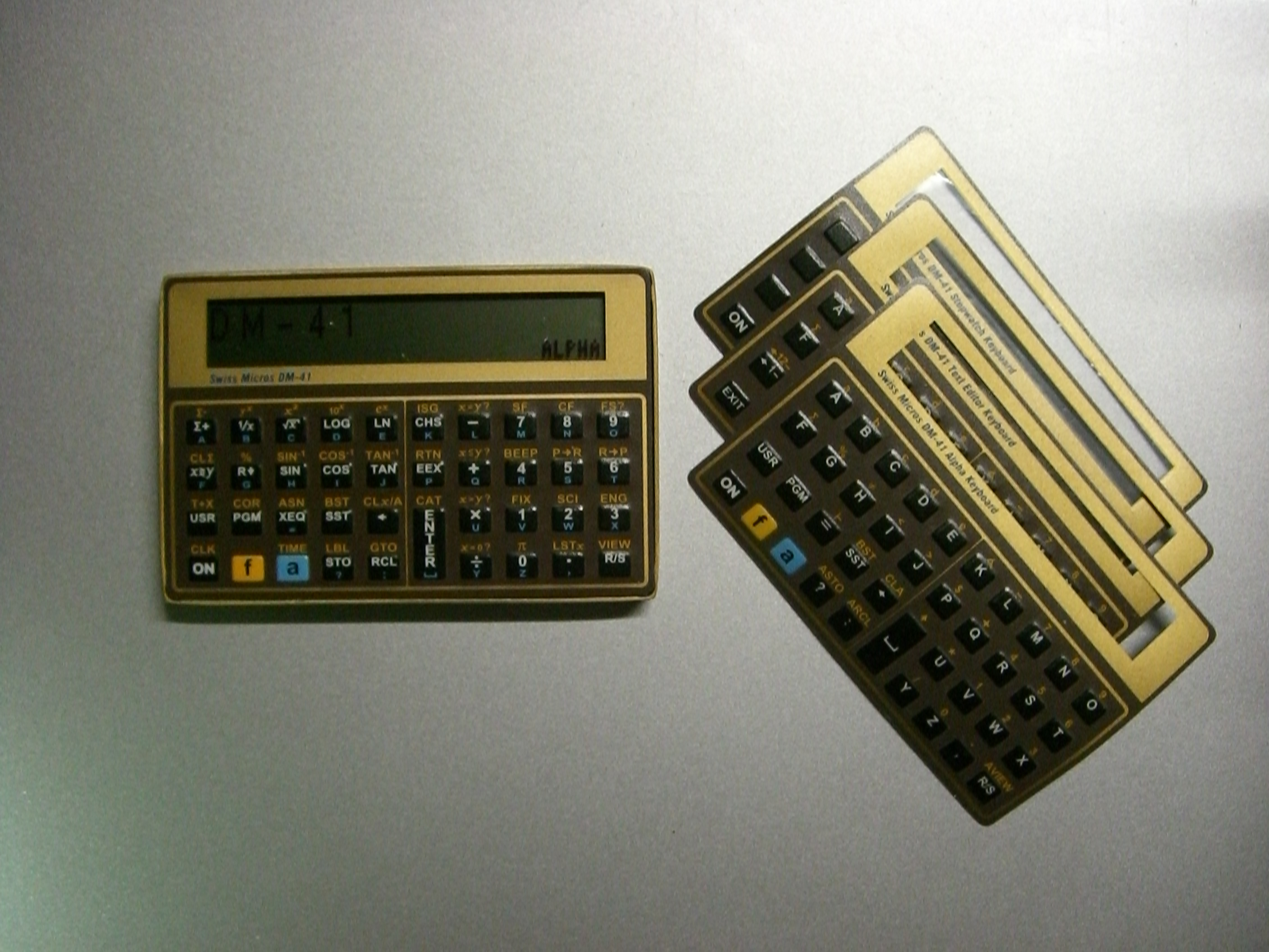 DM-41 カードサイズRPN電卓とオーバーレイ